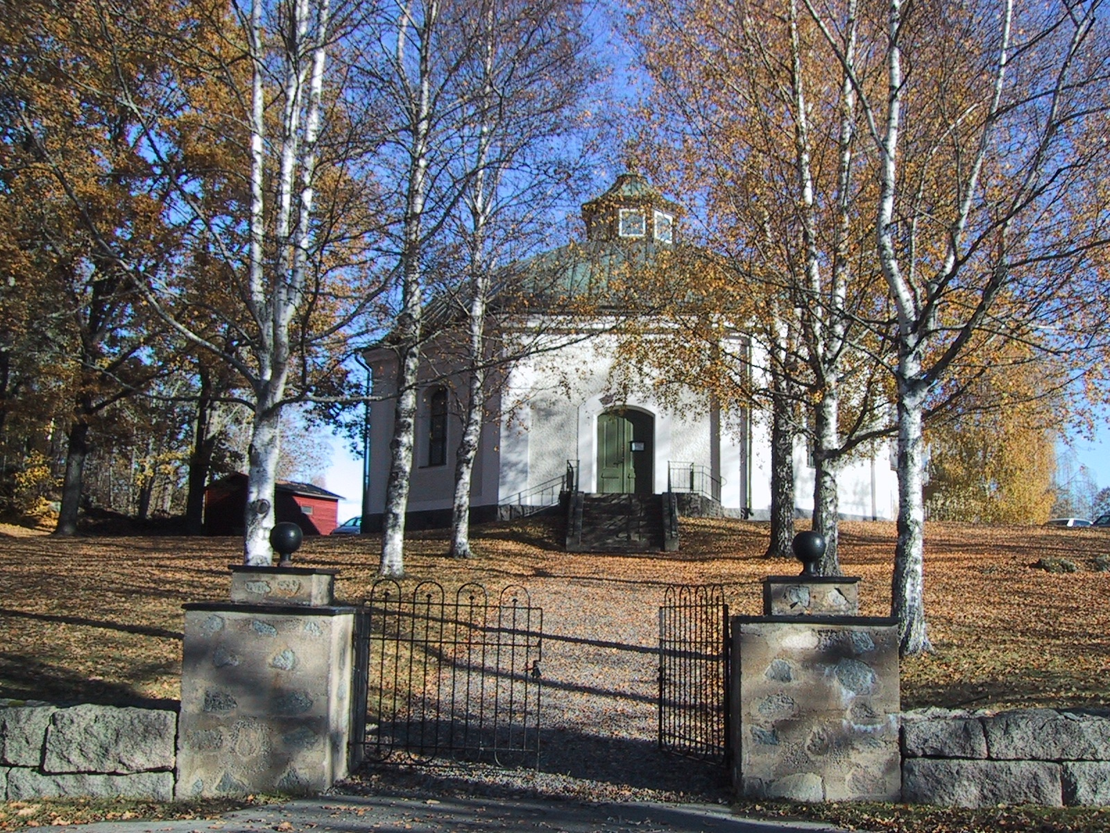 Vedevågs kyrka, exteriör bild av kyrkan och omgivande kyrkotomt.